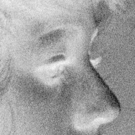 Starkes Korn bei einem auf ISO1600 belichteten und entwickelten Schwarzweiss-Kleinbildfilm Ilford HP4, entwickelt in Neofin rot. Ausschnitt.